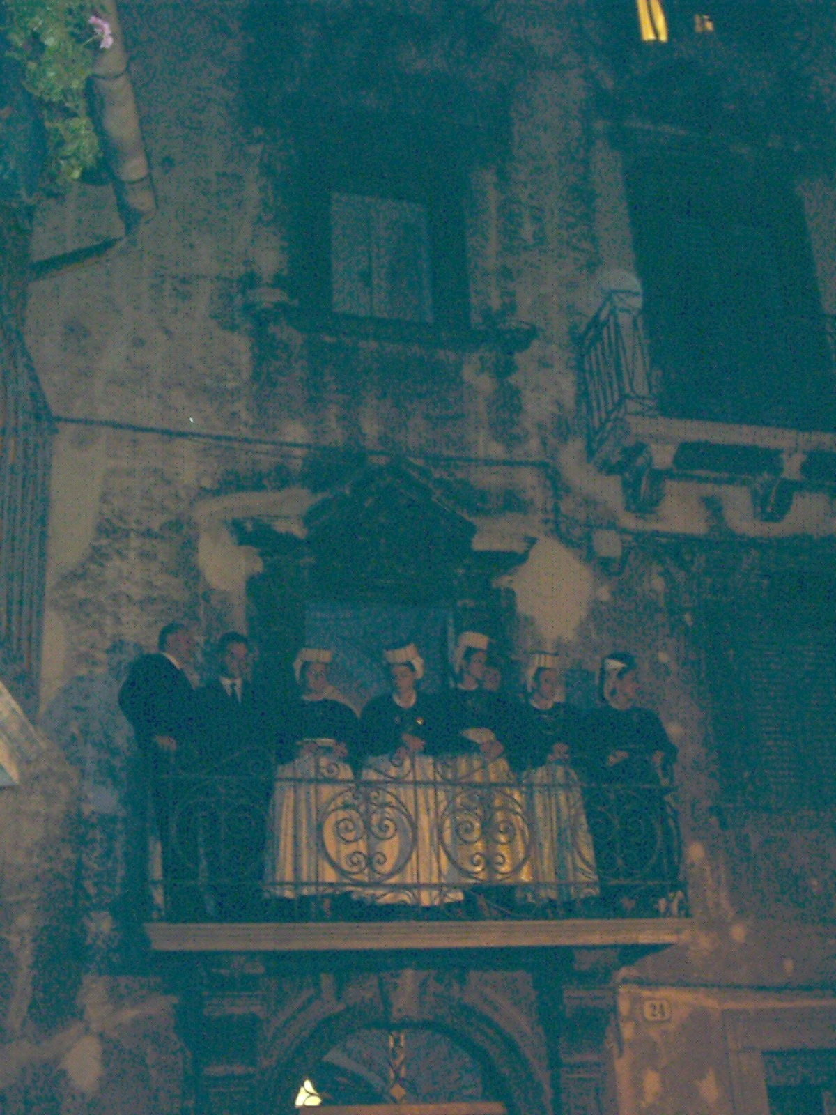 Palazzo Serafini-Ciancarelli di notte durante Ju Catenacce, Scanno, L'Aquila